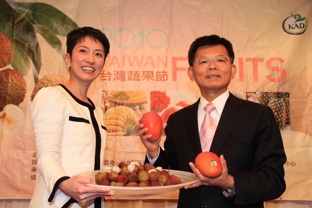 高雄縣長楊秋興在日本東京舉辦高縣優質水果展示及推薦說明晚宴，日本政壇當紅的台裔參議員蓮舫帶著母親、哥哥前來助陣，她還特別以中文致詞說，很喜歡吃台灣的水果，尤其是香蕉，她希望日本人能更加認識。